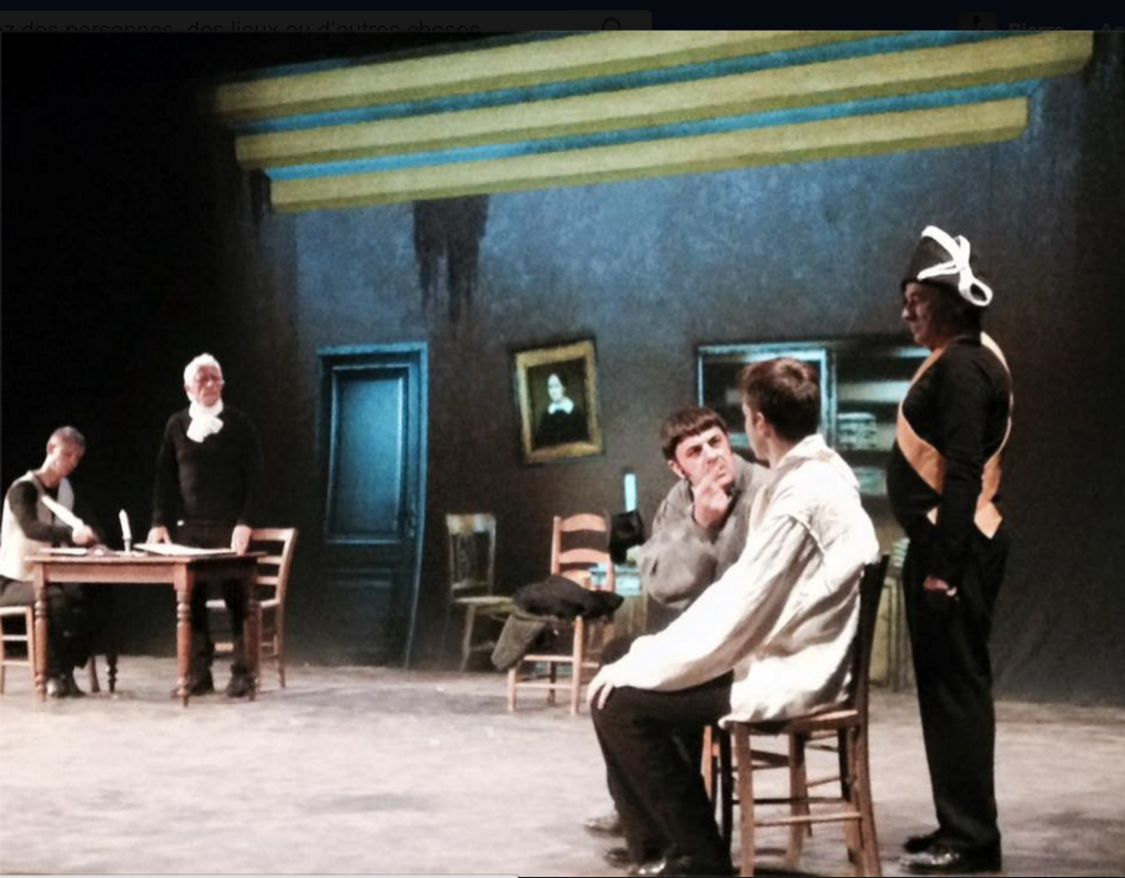 Pièce de théâtre de Paul Astruc mise en scène par Laurent Cornic, produite par 'Rutènes en scène' et interprétée par 35 comédiens du 27 au 30 juillet 2016